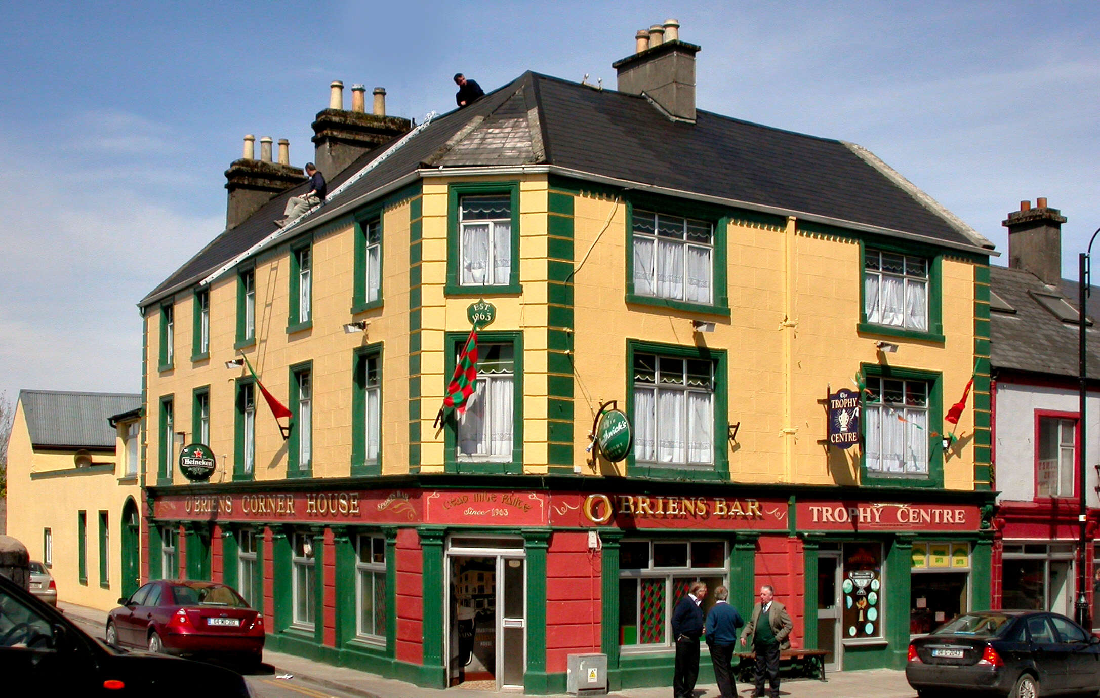 Ag deisiu an dion, Clár Clainne Mhuiris